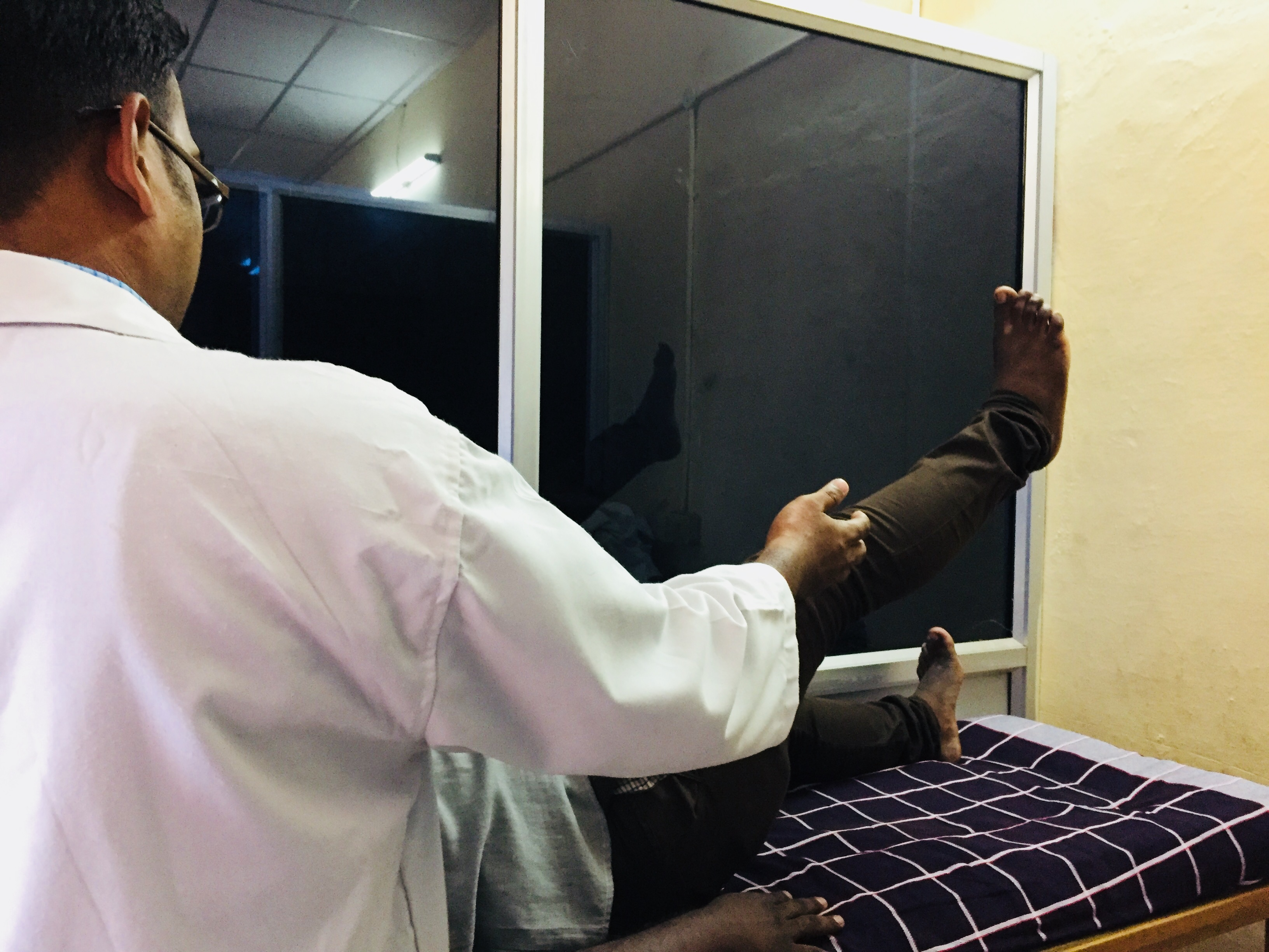 active movement